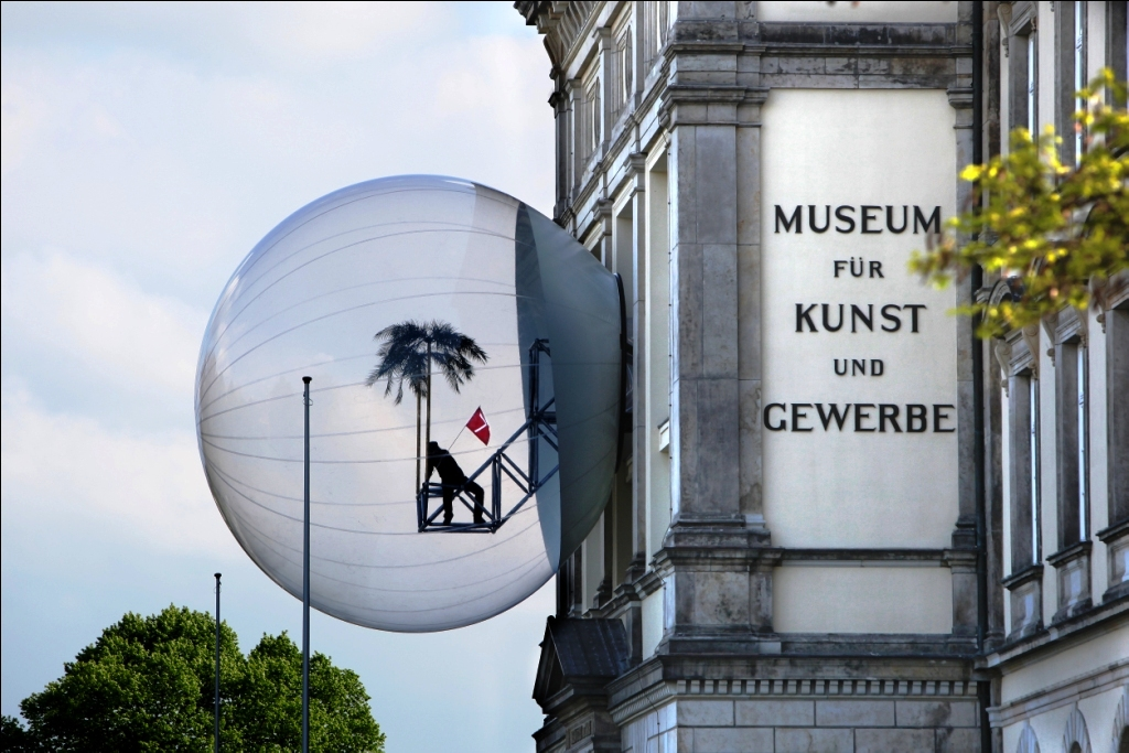 Fassade MKG mit "Oase Nr. 7" von Haus-Rucker-Co im Rahmen der Ausstellung Klimakapseln 2010